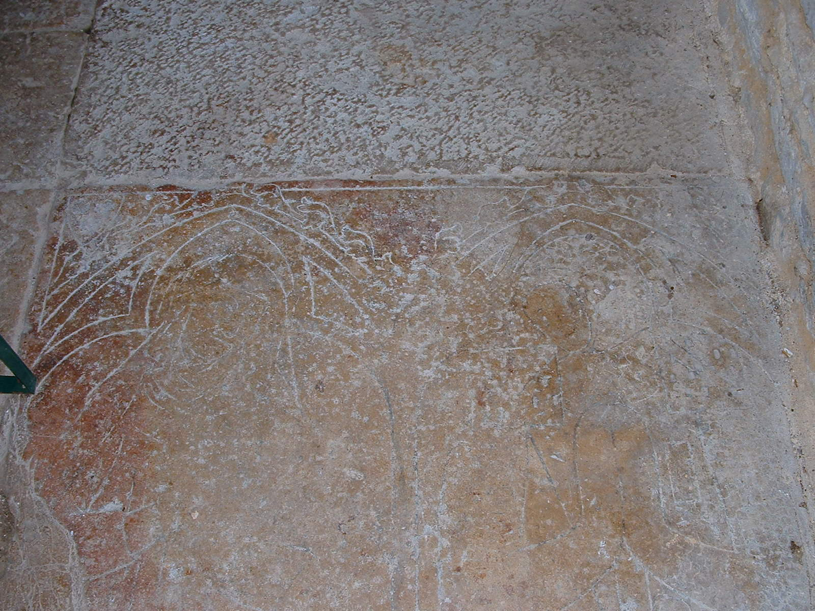 Châtel-Gérard (Yonne) - Prieuré de Vausse : pierre tombale d'Anséric de Montréal